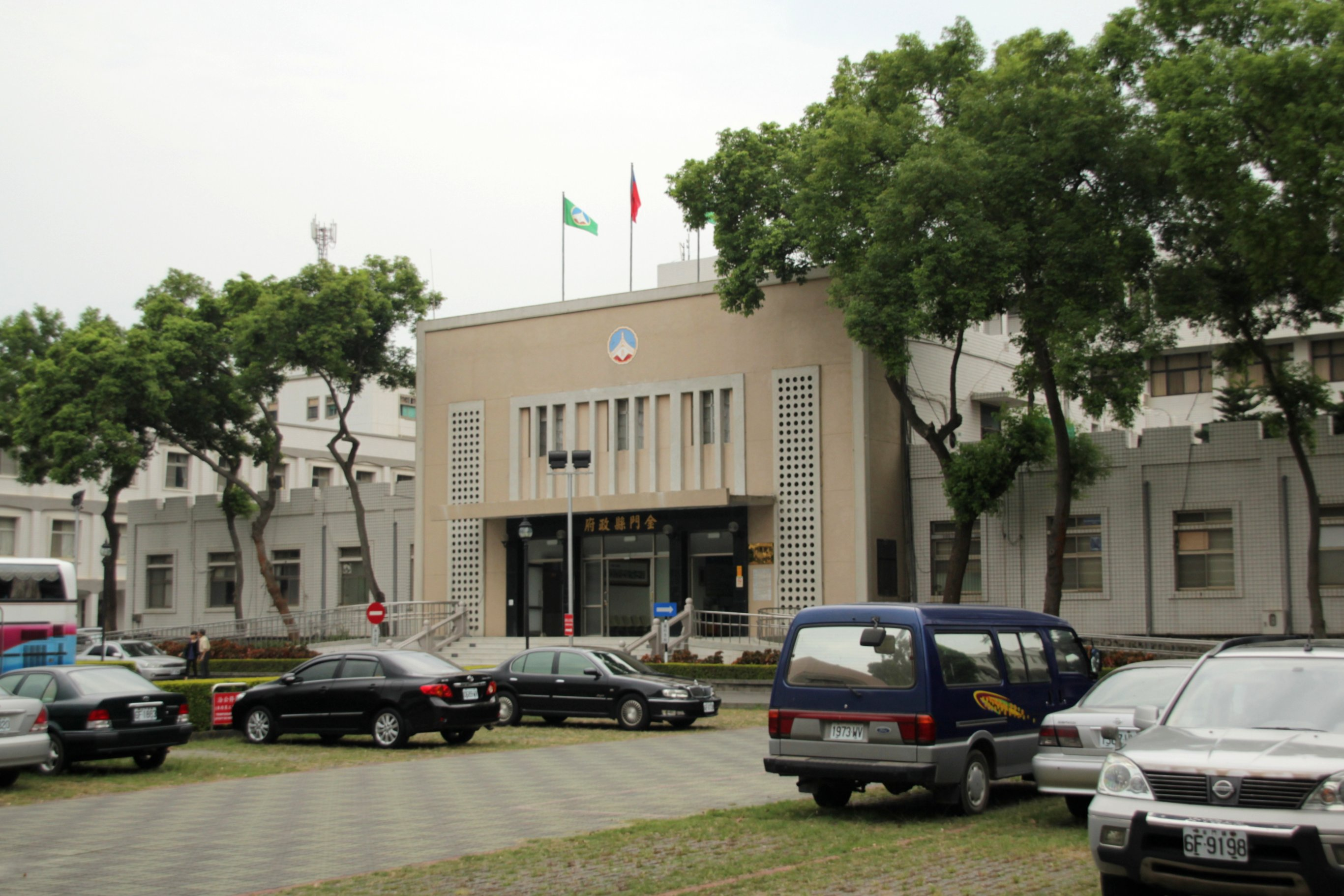 金門縣政府，位於中華民國福建省金門縣金城鎮民生路60號。